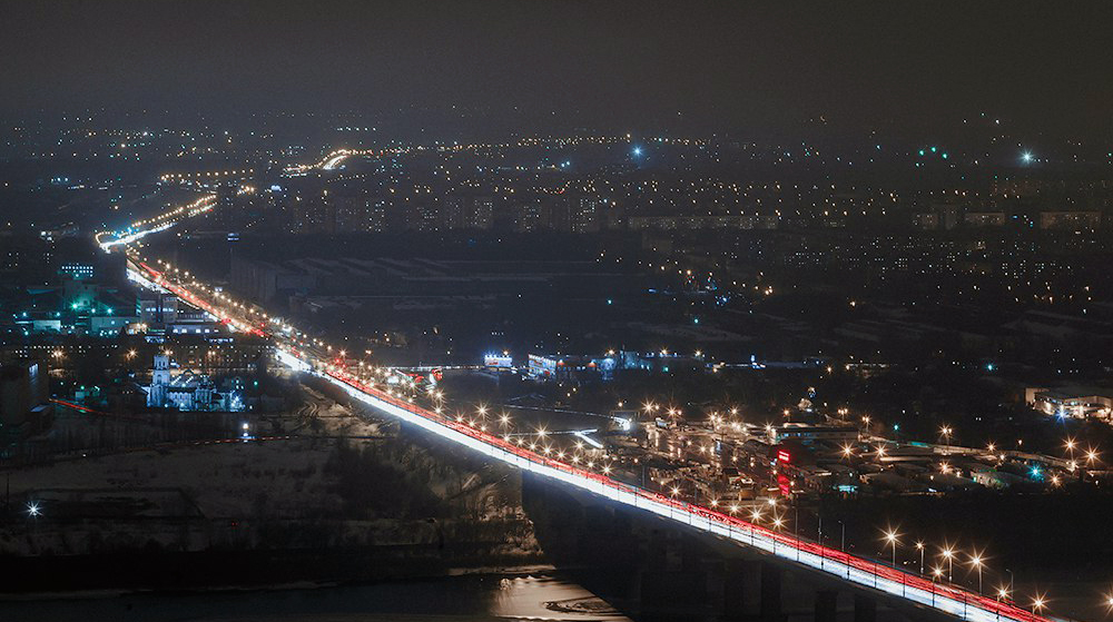 Мызинский мост